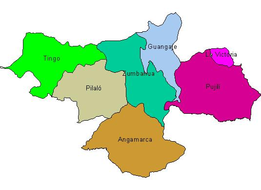 Parroquias del Cantón Pujilí, en la provincia de Cotopaxi, en Ecuador.